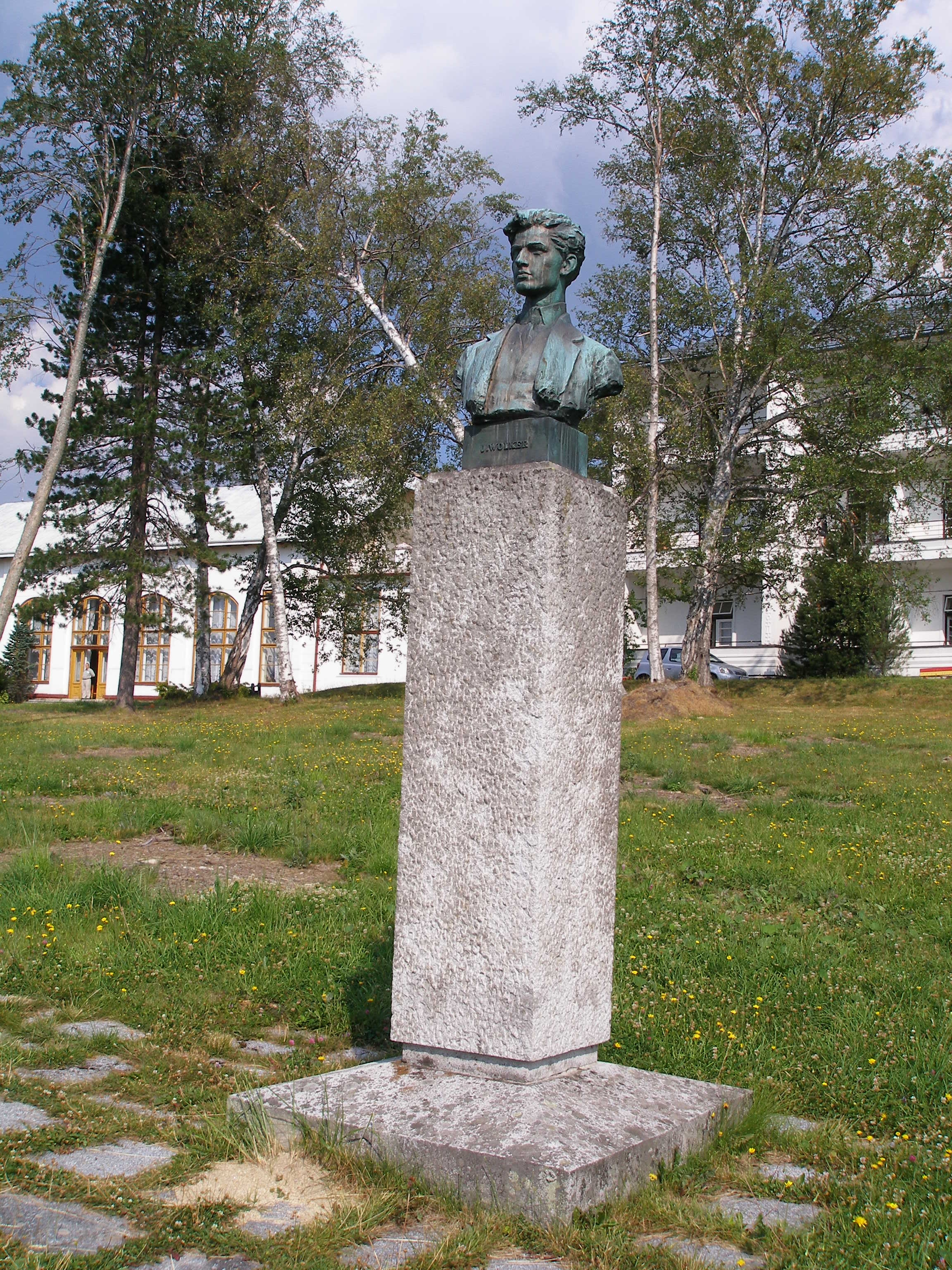 Jiří Wolker, busta, osada Tatranská Polianka, Slovensko This medium shows the protected monument with the number 706-1430/0 in the Slovak Republic.